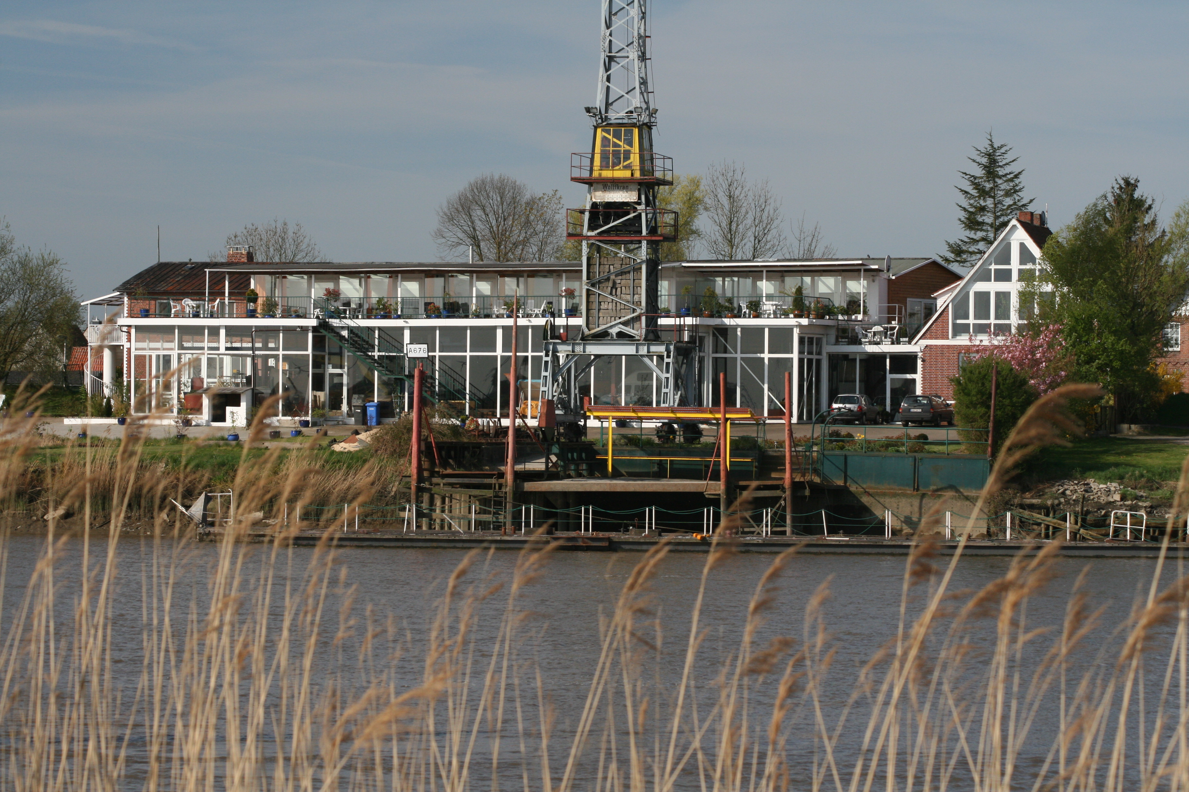 Geversdorf (Oste): Die Ostewerft